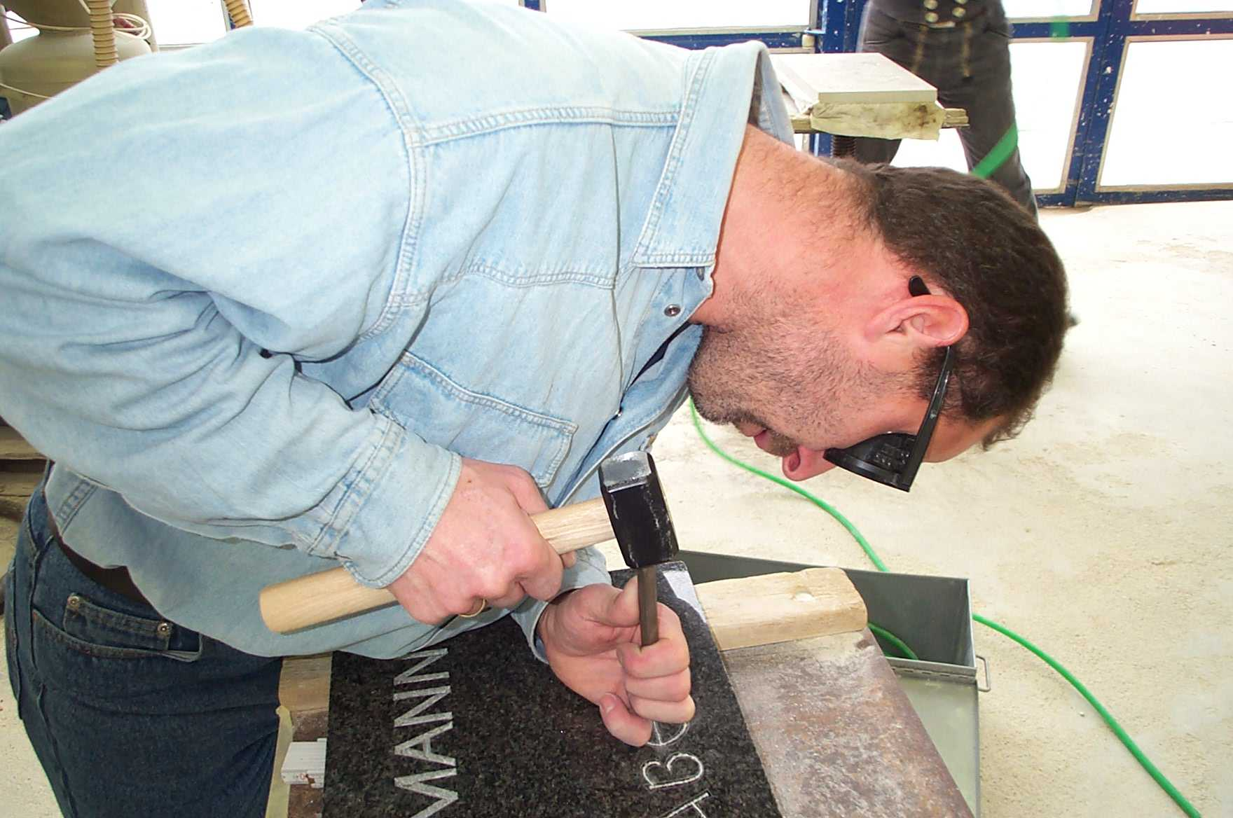 Schrift